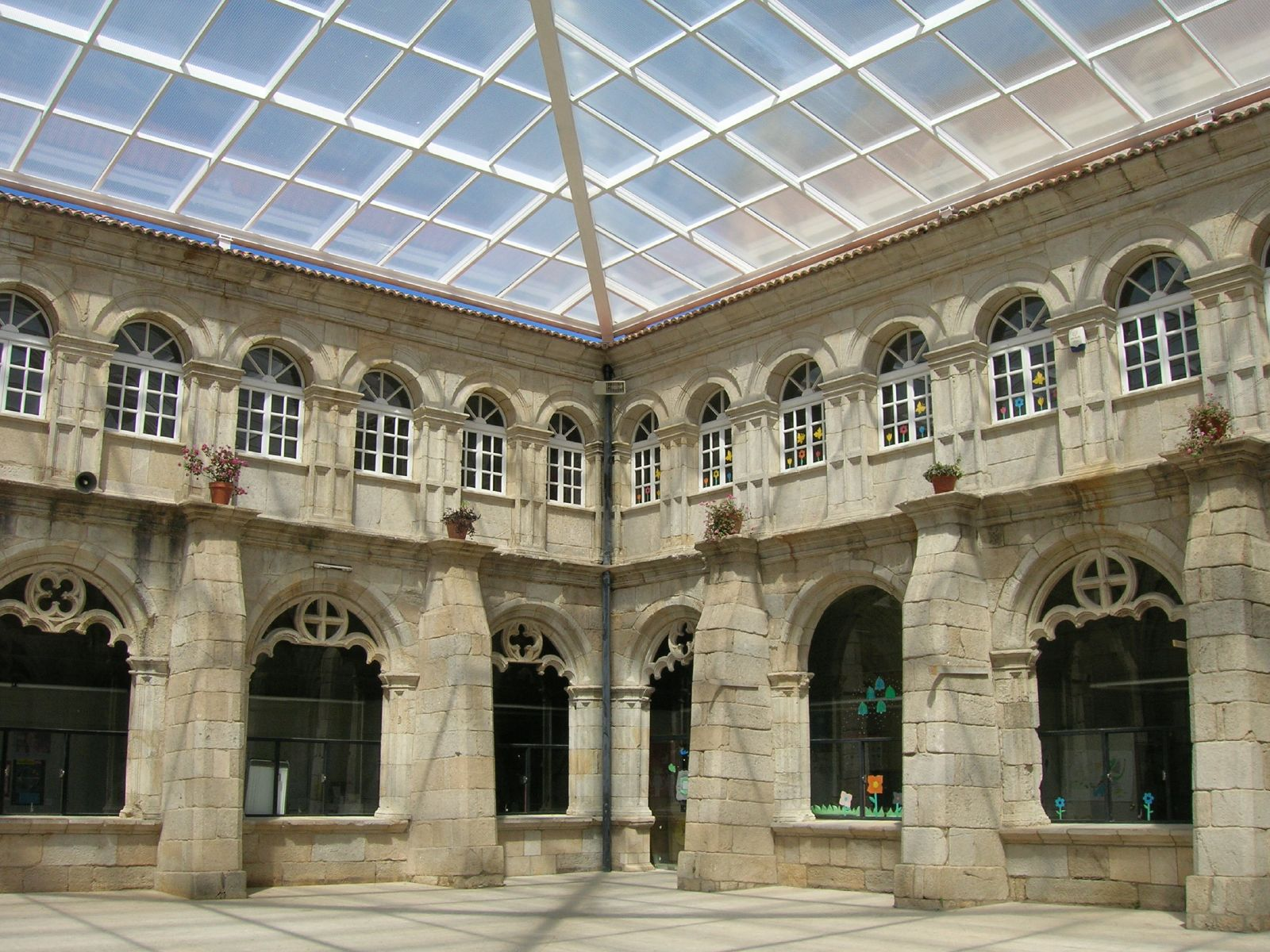 Monasterio de Montederramo. Claustro Reglar con su moderna cubierta acristalada. Actualmente alberga el colegio de educación primaria.